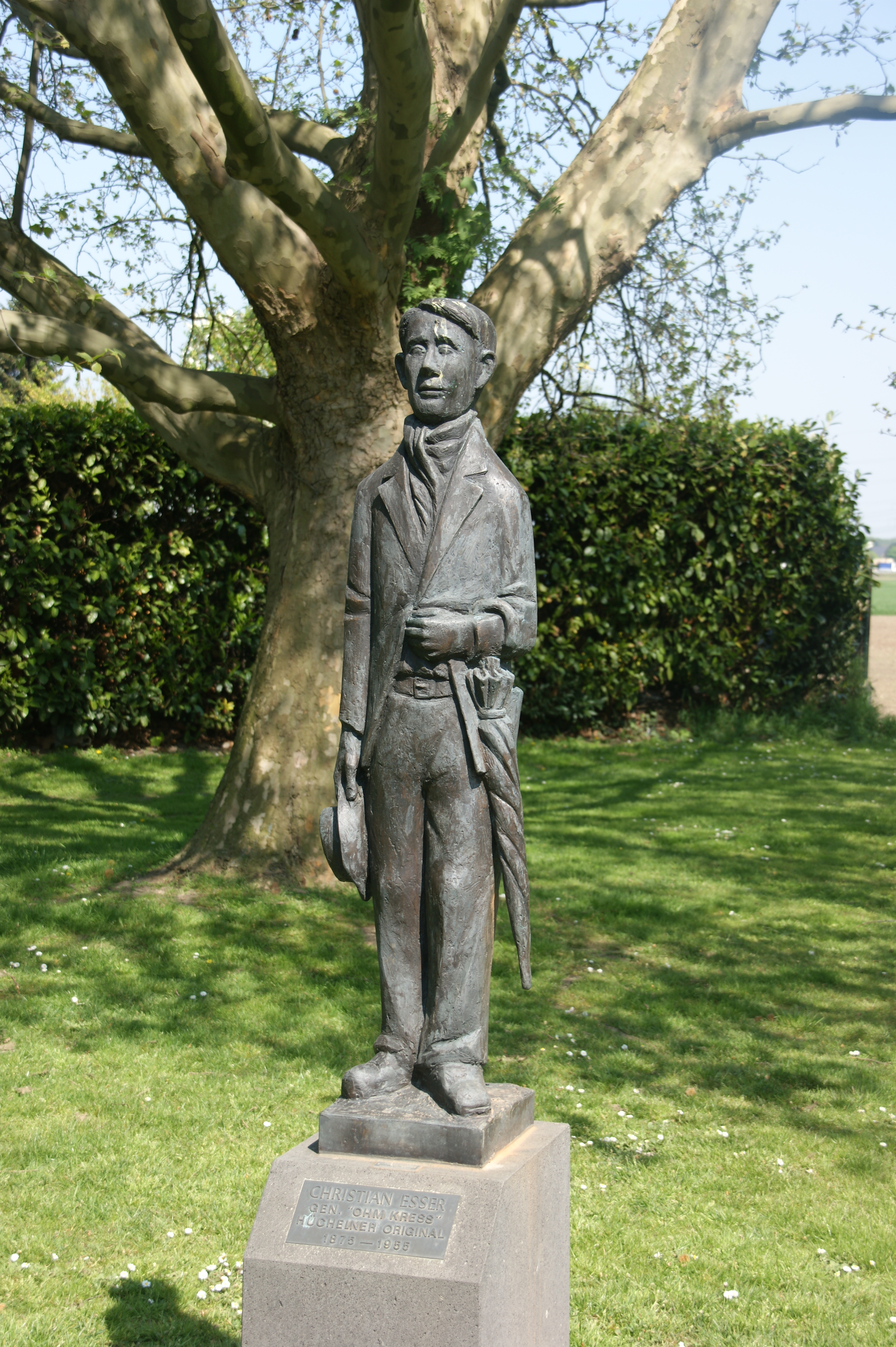 "Ohm Kress" Denkmal für Christian Esser (1875-1955) in Frechen-Hücheln, gestaltet von Olaf Höhnen